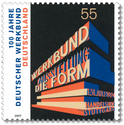 Sonderbriefmarke “100 Jahre Deutscher Werkbund” mit einem Plakat zur Werkbundausstellung »Die Form« 1924 von Richard Herre (1885–1959), Nennwert: 55 cent, Ausgabetag: 11. Oktober 2007